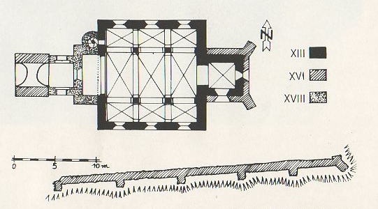 Planul bisericii si a fortificatiei din Veseud (Chirpar).